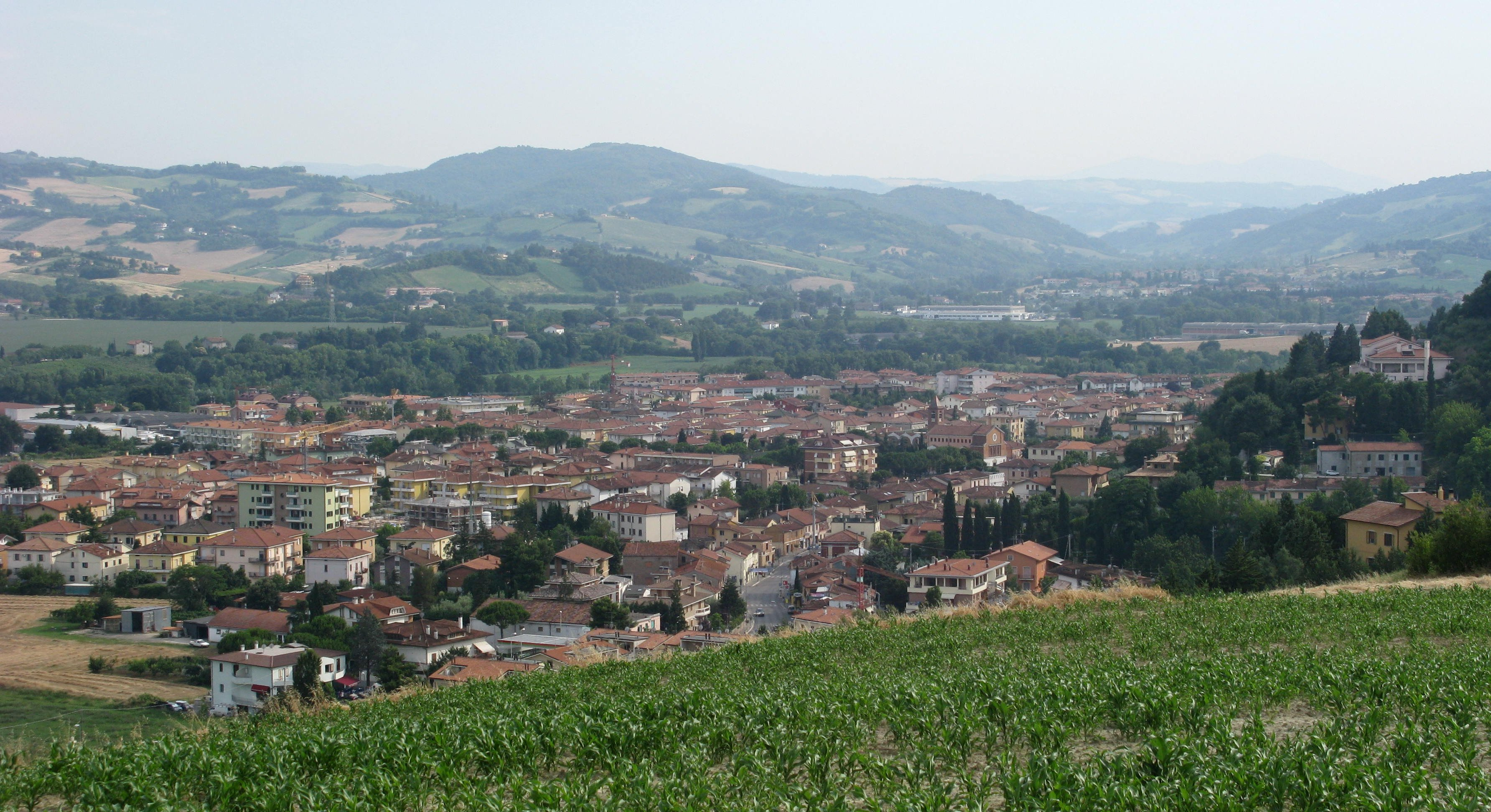 Panorama di Montècchio, frazione di S. Angelo in Lizzola.